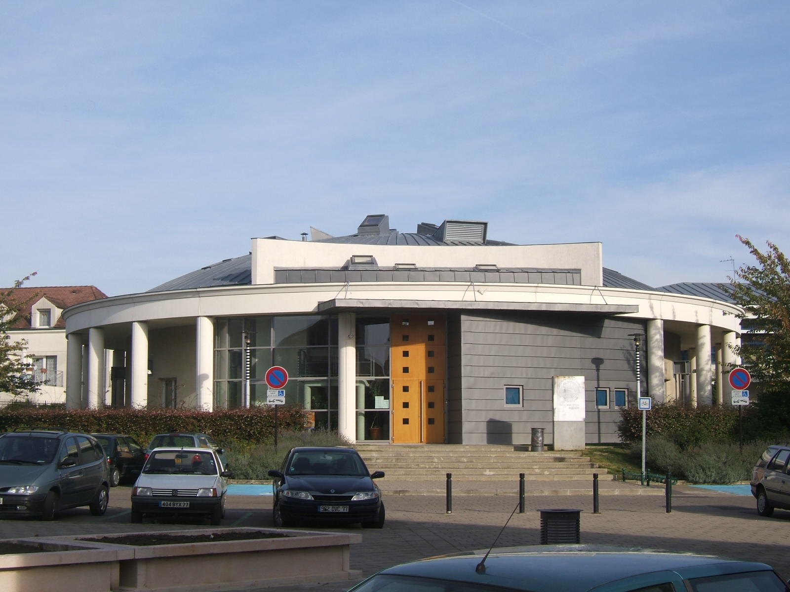 Conservatoire municipale de musique de Bussy-Saint-Georges (Seine-et-Marne, France)